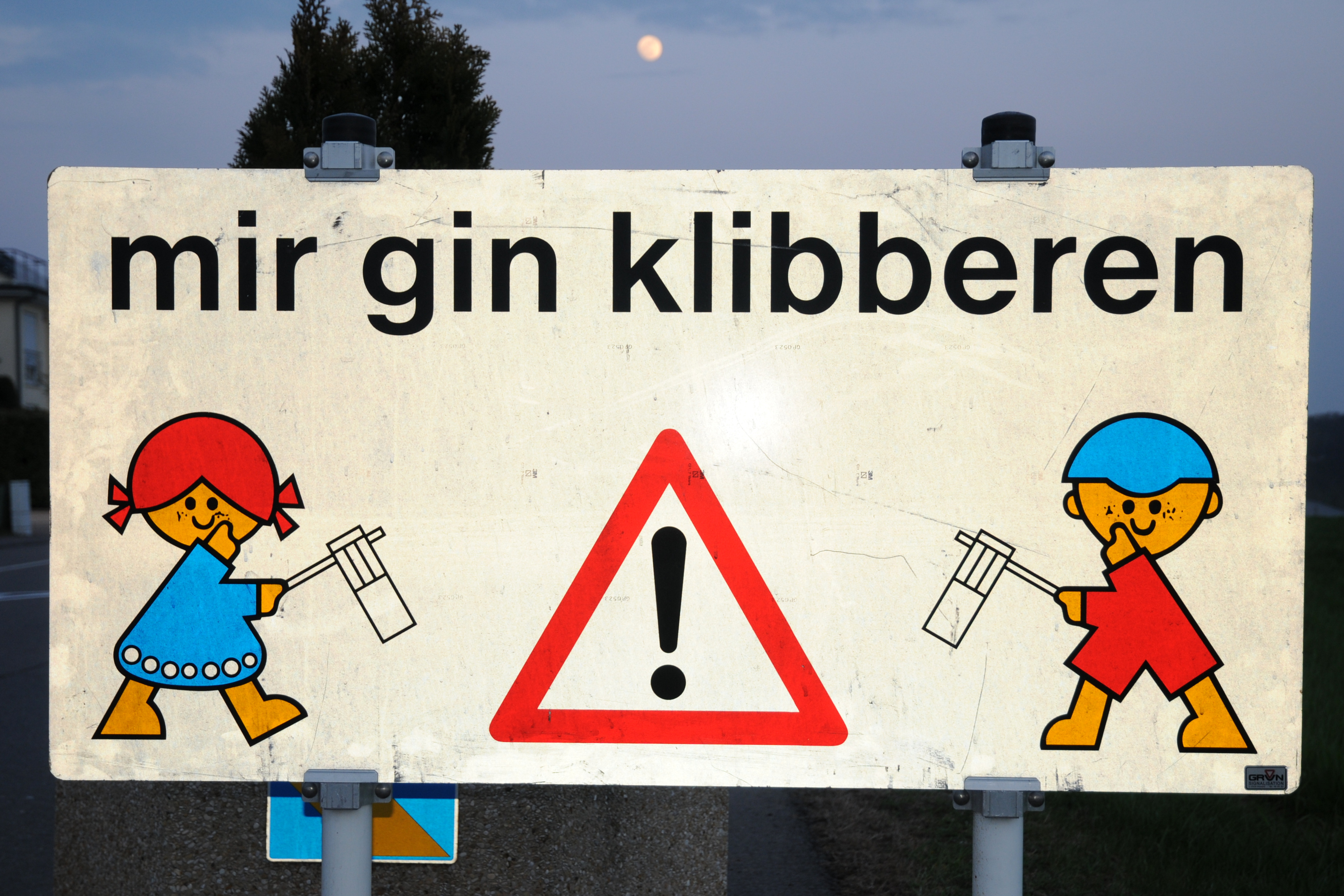 Fir op d'Klibberjongen a Meedercher opmierksam ze maachen.